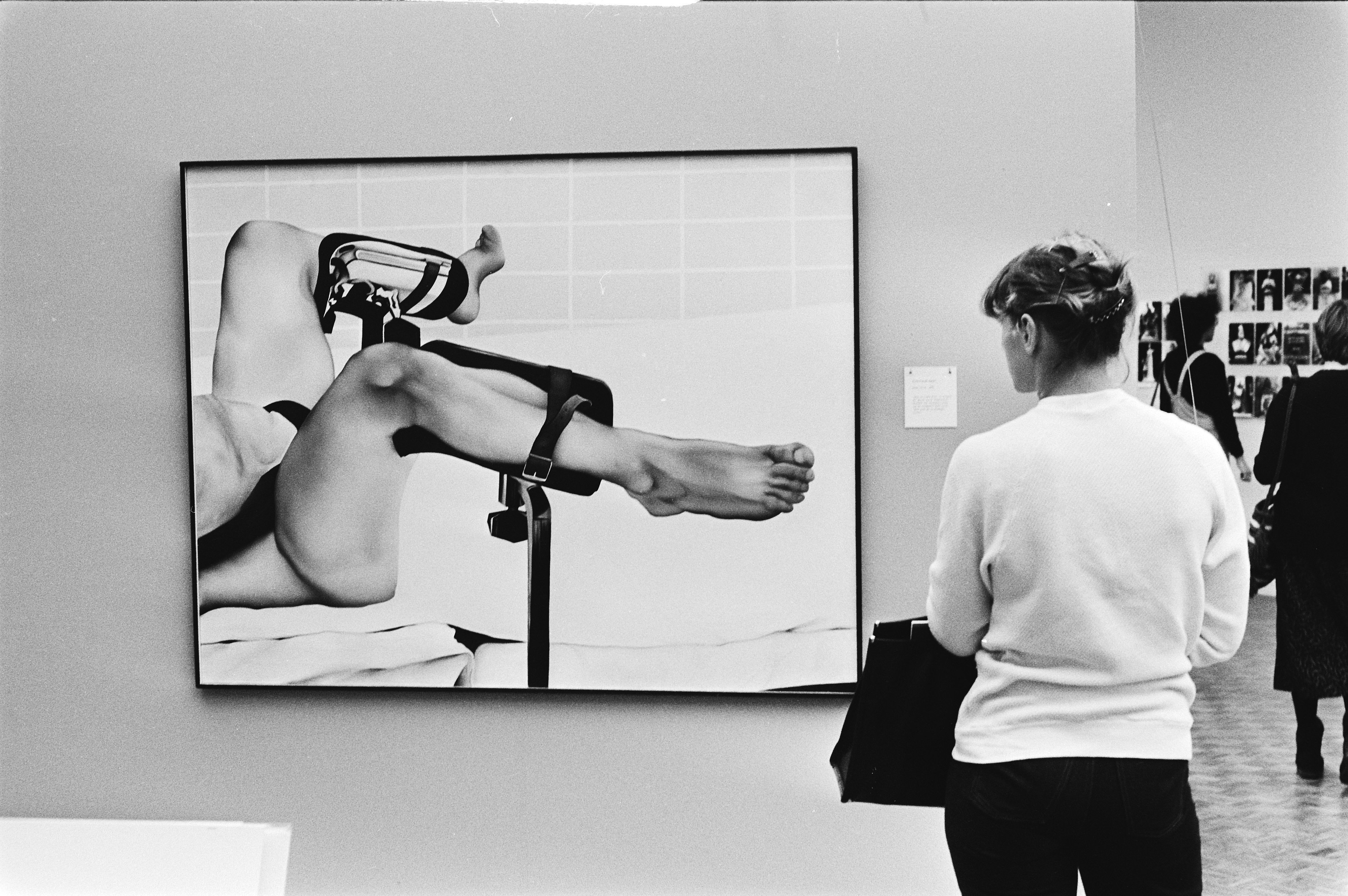 Collectie / Archief : Fotocollectie Anefo Reportage / Serie : Tentoonstelling "Feministische kunst, internationaal" in Haags Gemeentemuseum Beschrijving : Vrouw bekijkt het schilderij "Baas in eigen buik" van Maina-Miriam Munsky (1943-1999) Datum : 14 november 1979 Locatie : Den HaagZuid-Holland Trefwoorden : feminisme, kunst, schilderijen, tentoonstellingen, vrouwen Persoonsnaam : Munsky, Maina-Miriam Fotograaf : Suyk, Koen / Anefo Auteursrechthebbende : Nationaal Archief Materiaalsoort : Negatief (zwart/wit) Nummer archiefinventaris : bekijk toegang 2.24.01.05 Bestanddeelnummer : 930-5396